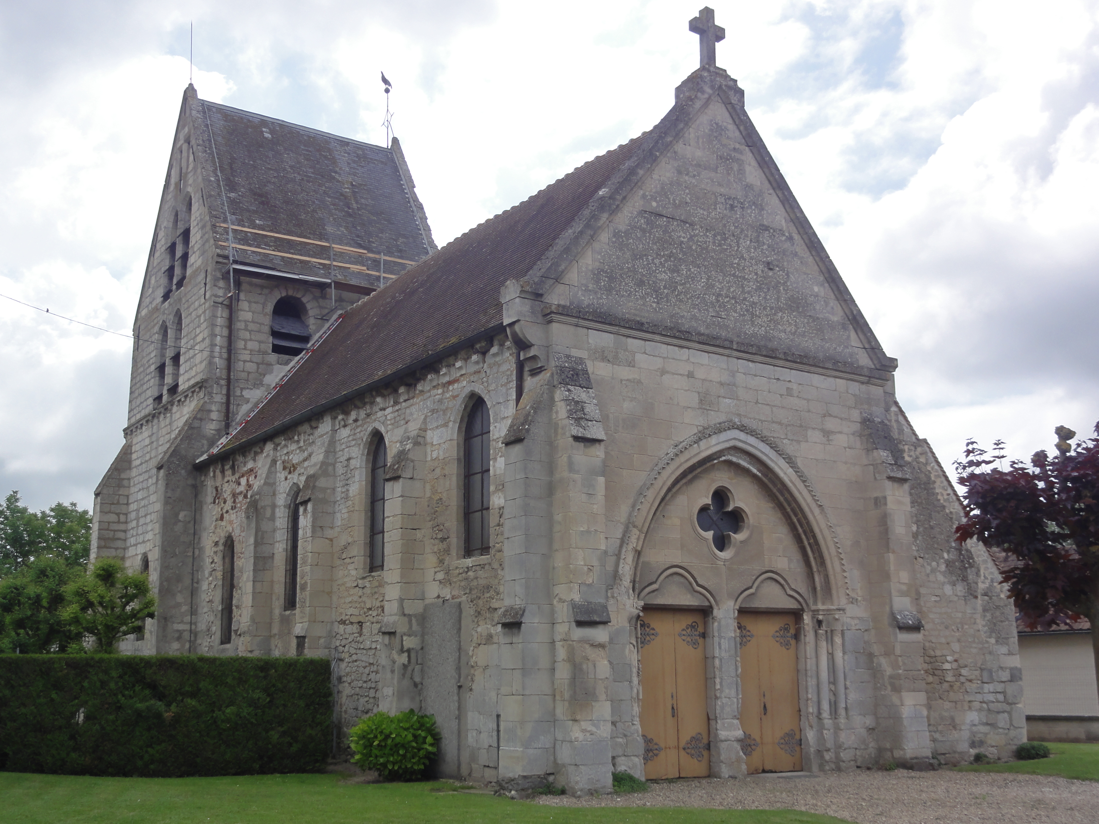 Houdancourt (Oise) Église